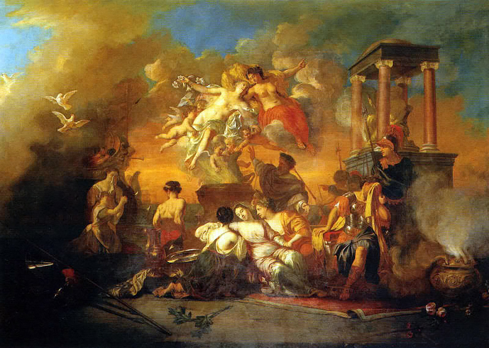 Августин Тервестен Старший. Плафон «Жертвоприношение Ифигении», 1690 год. Находится в Чесменском зале Большого Петергофского дворца. Ранее находился в одном из особняков Ленинграда. Использован при восстановлении Чесменского зала после Великой Отечественной войны вместо утраченного при пожаре 1941 года плафона Лоренцо Вернера «Церера, вручающая колосья первому земледельцу Триптолему» 1751 года. Восстановленный зал открыт в 1969 году.